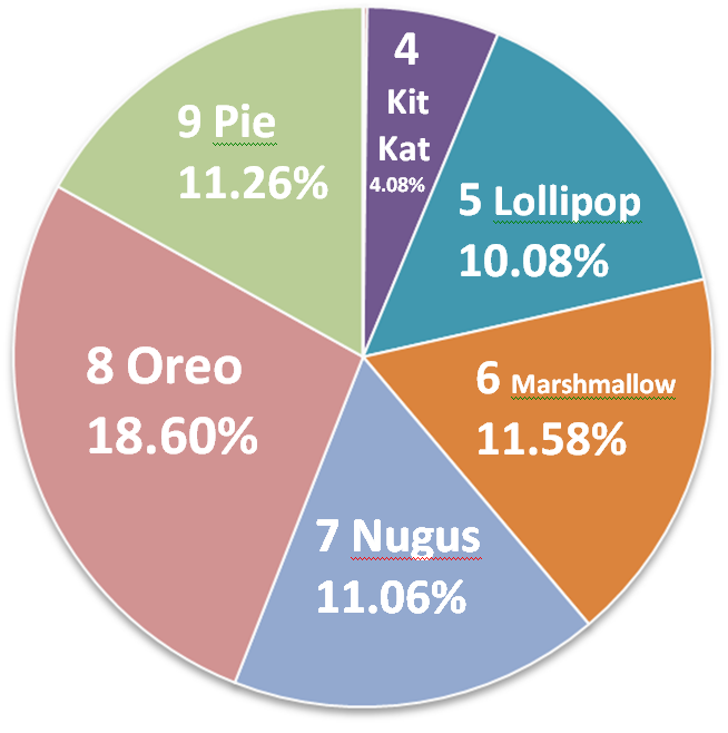 สัดส่วนผู้ใช้แอนดรอยด์ (1)